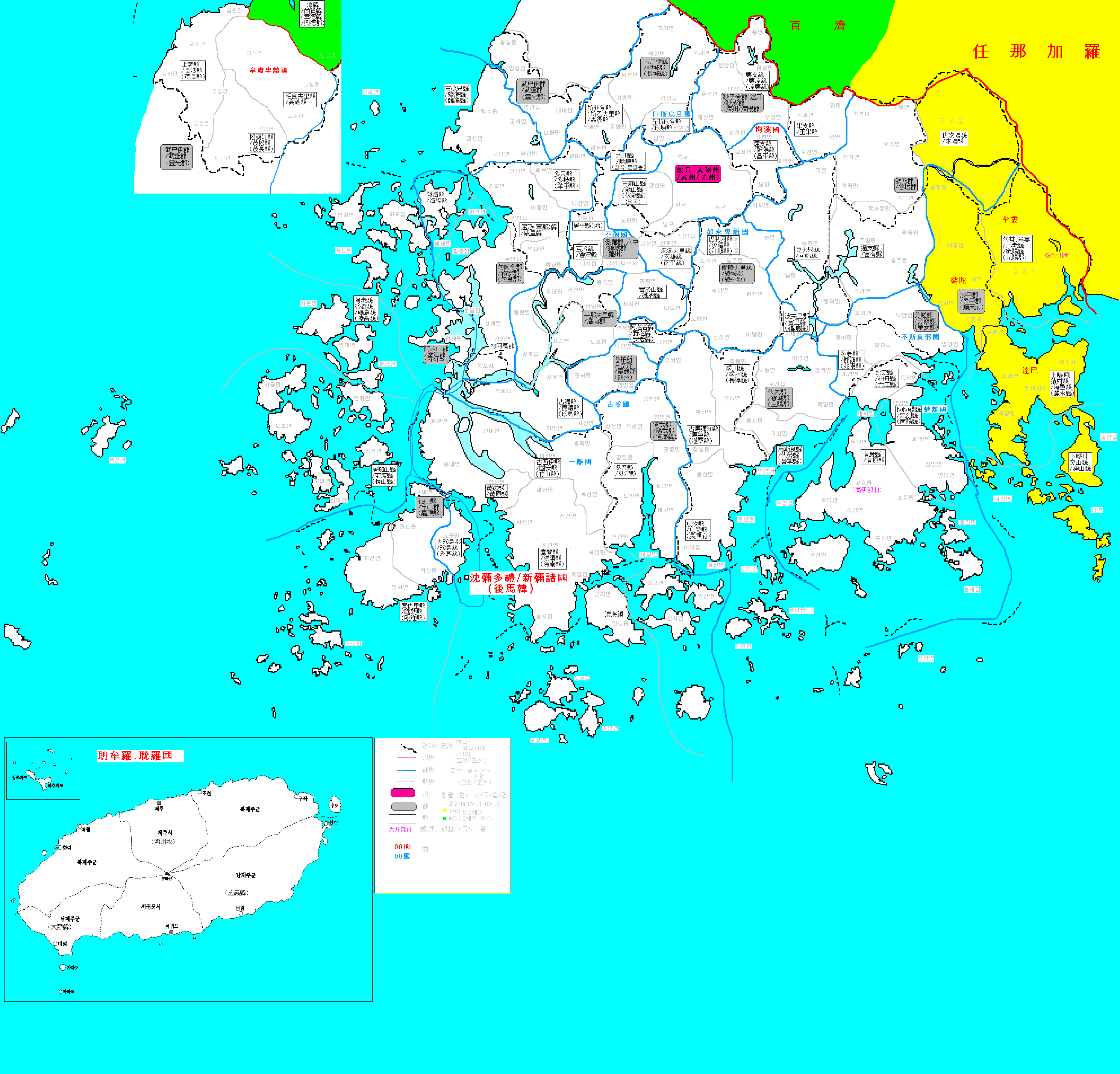 무진주도